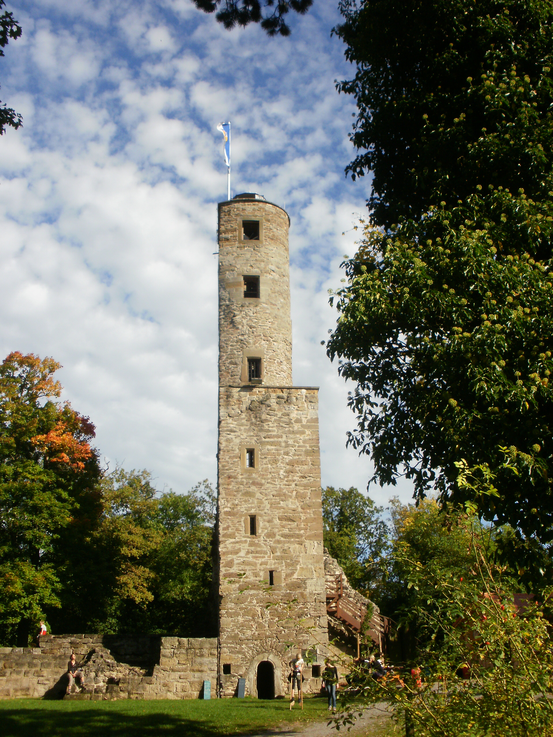 Burgruine Löwenstein, Deutschland